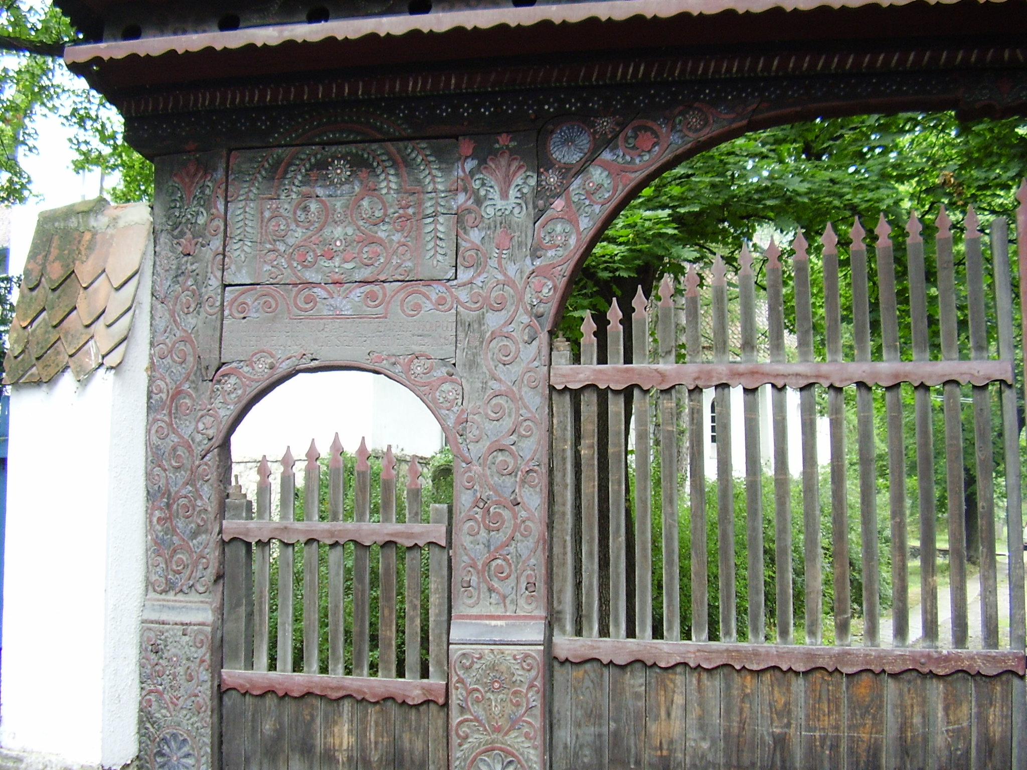 Székelykapu, Sepsiszentgyörgy